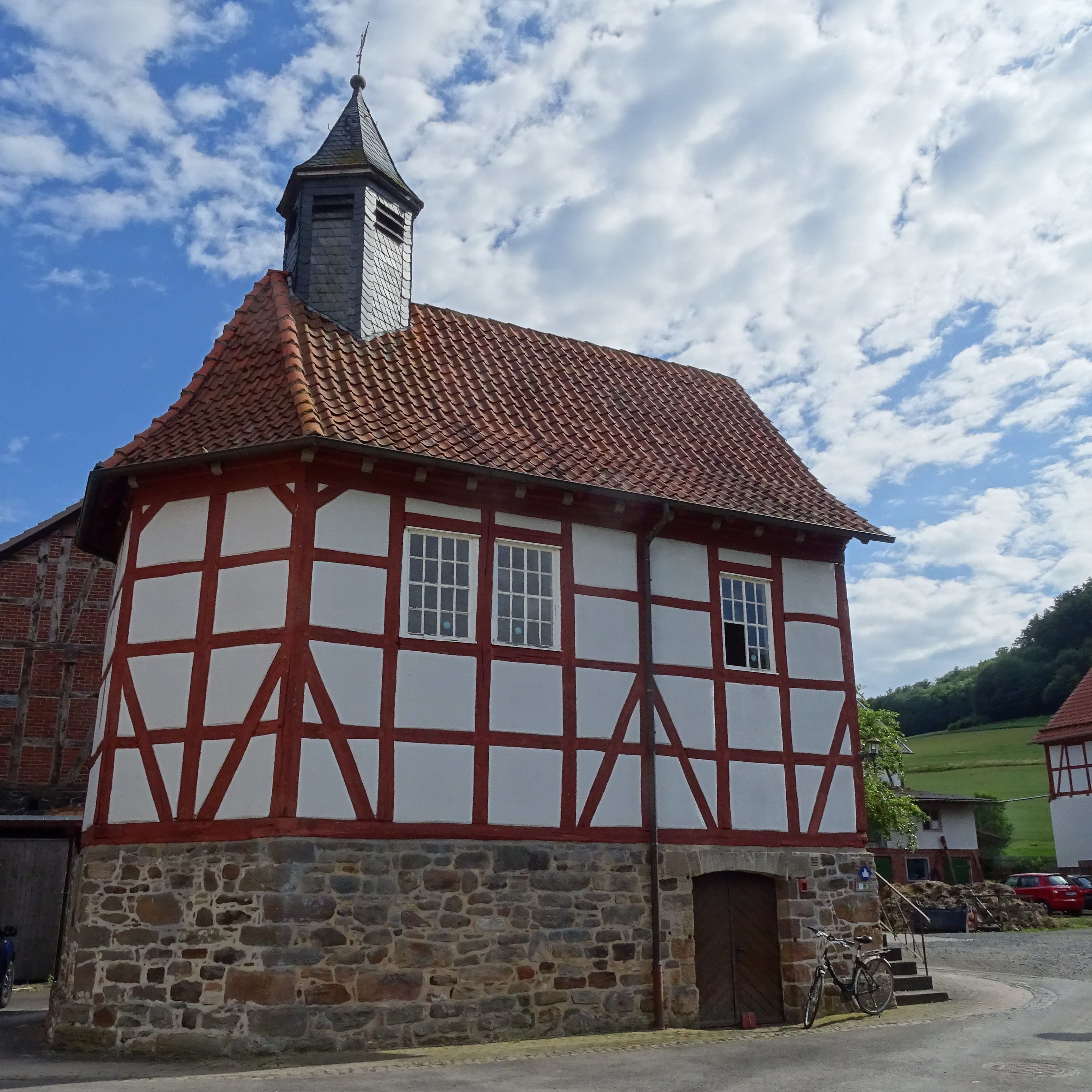 Ortskirche, Radfahrerkirche